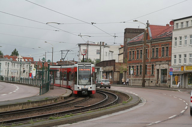 Haltestelle Ammendorf, Florian-Geyer-Platz